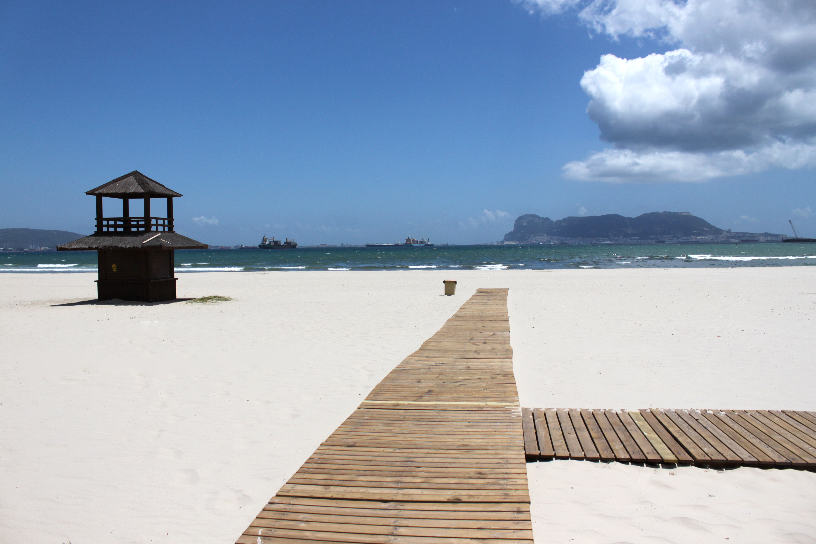 Playa de El Rinconcillo, Algeciras, Andalucía, España